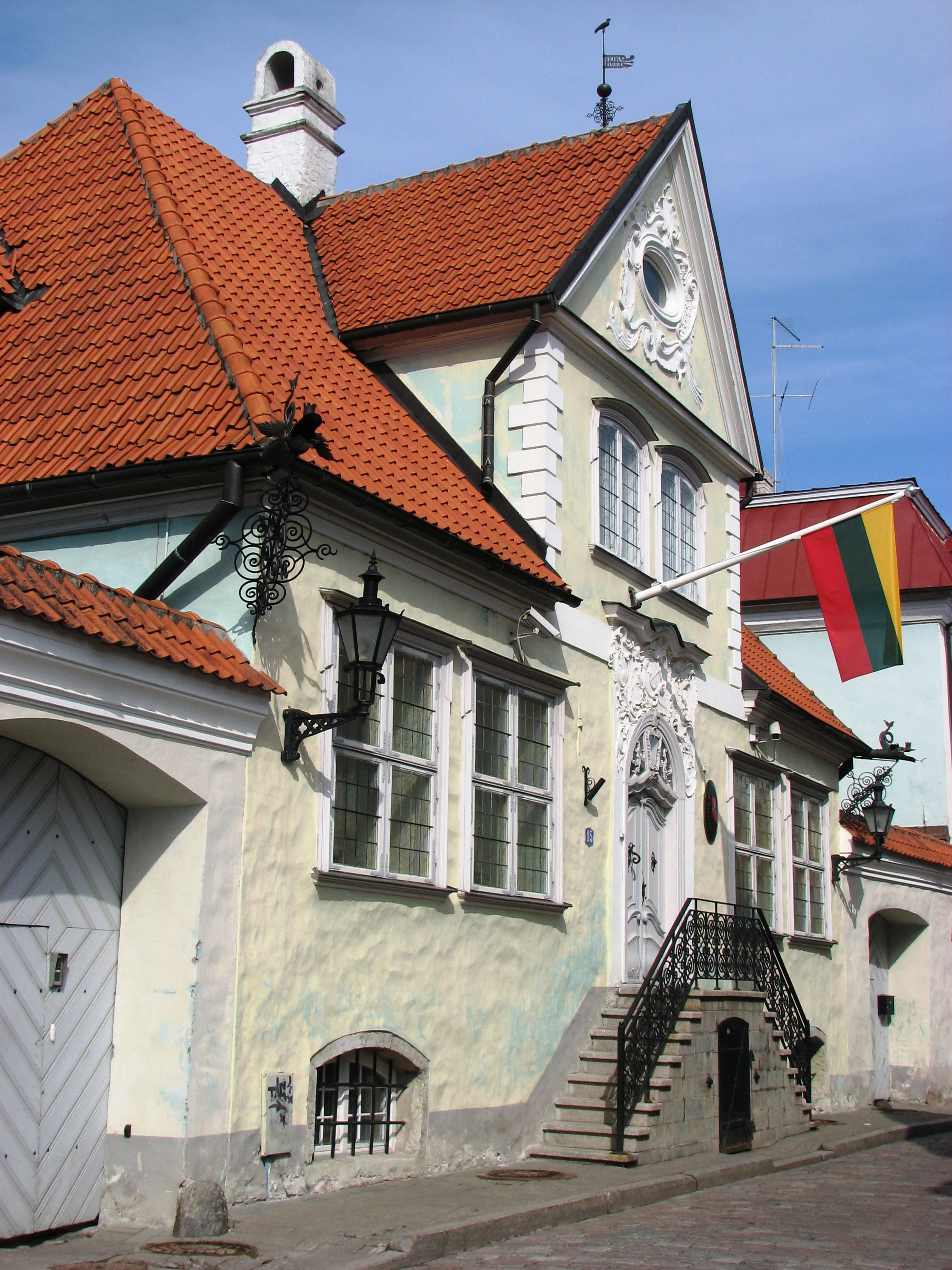 Leedu Suursaatkond Eestis, Uus 15 Tallinn